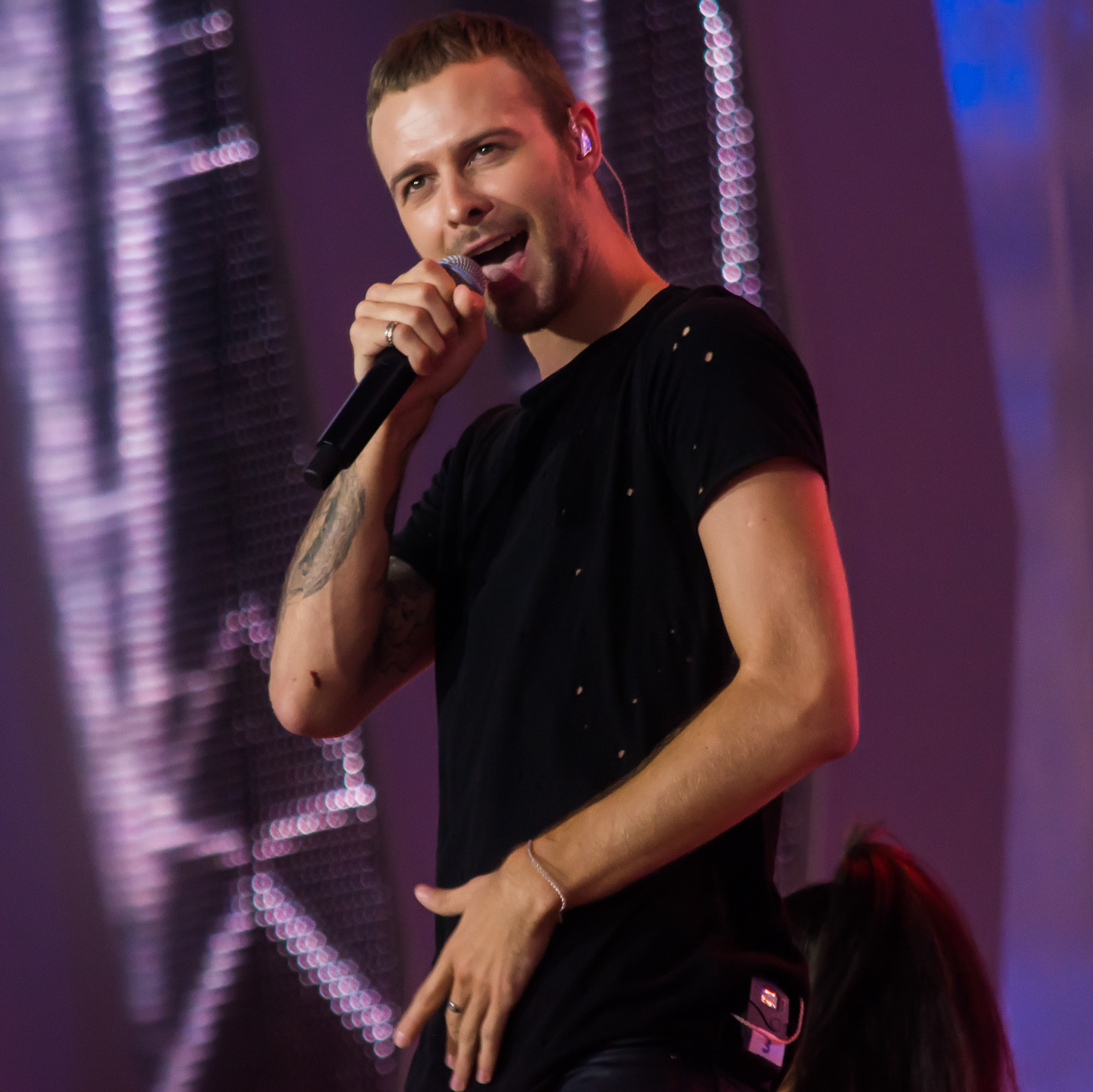 Макс Барских на Europa Plus TV. Hit Non Stop в Витебске 2016